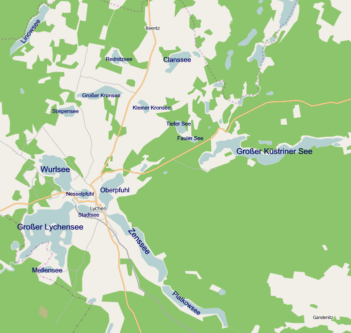 Lageplan des Lychener Seenkreuz